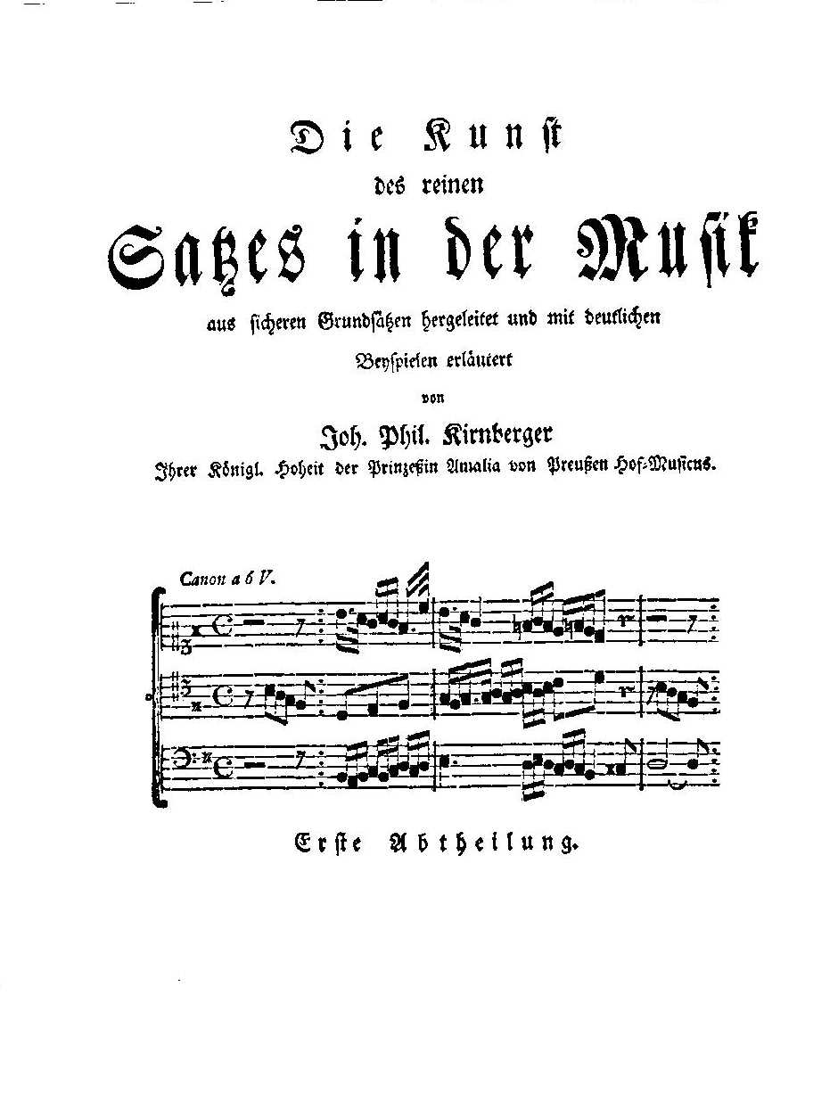 Cover von "Die Kunst des reinen Satzes in der Musik" (groß)